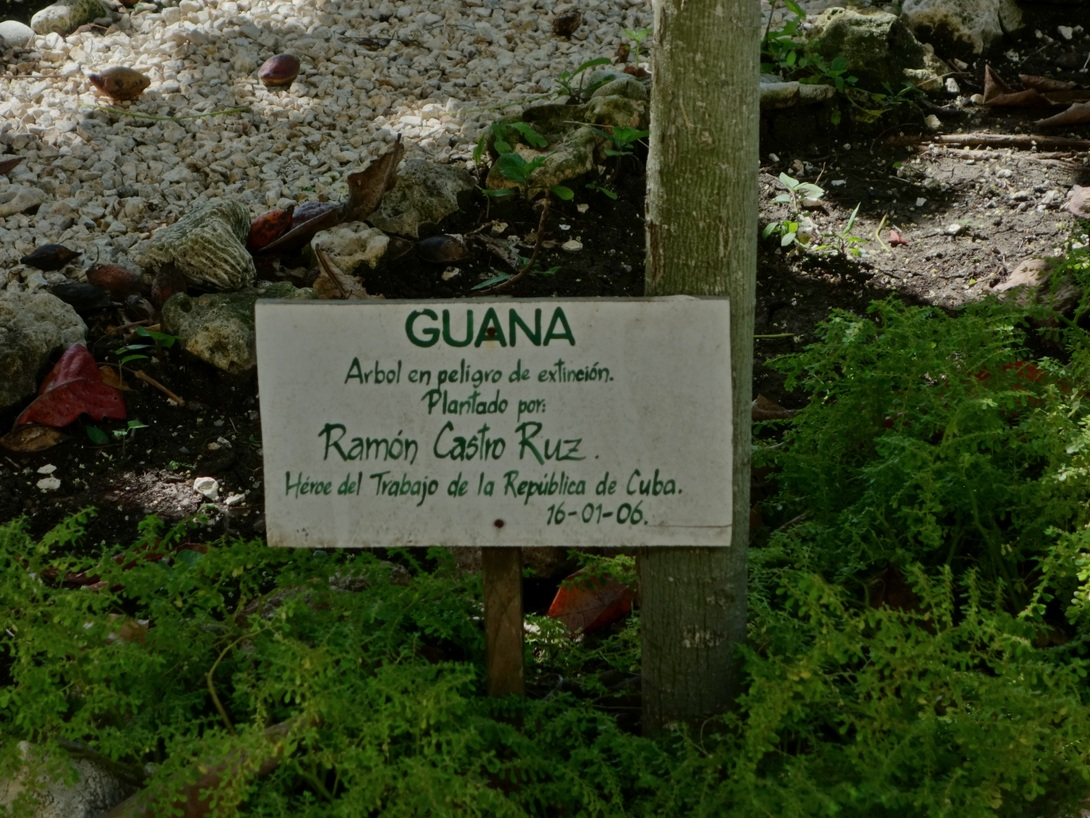 Gedenktafel an einem von Ramón Castro gepflanztem Baum, Hotelanlage in Provinz Holguín, Kuba